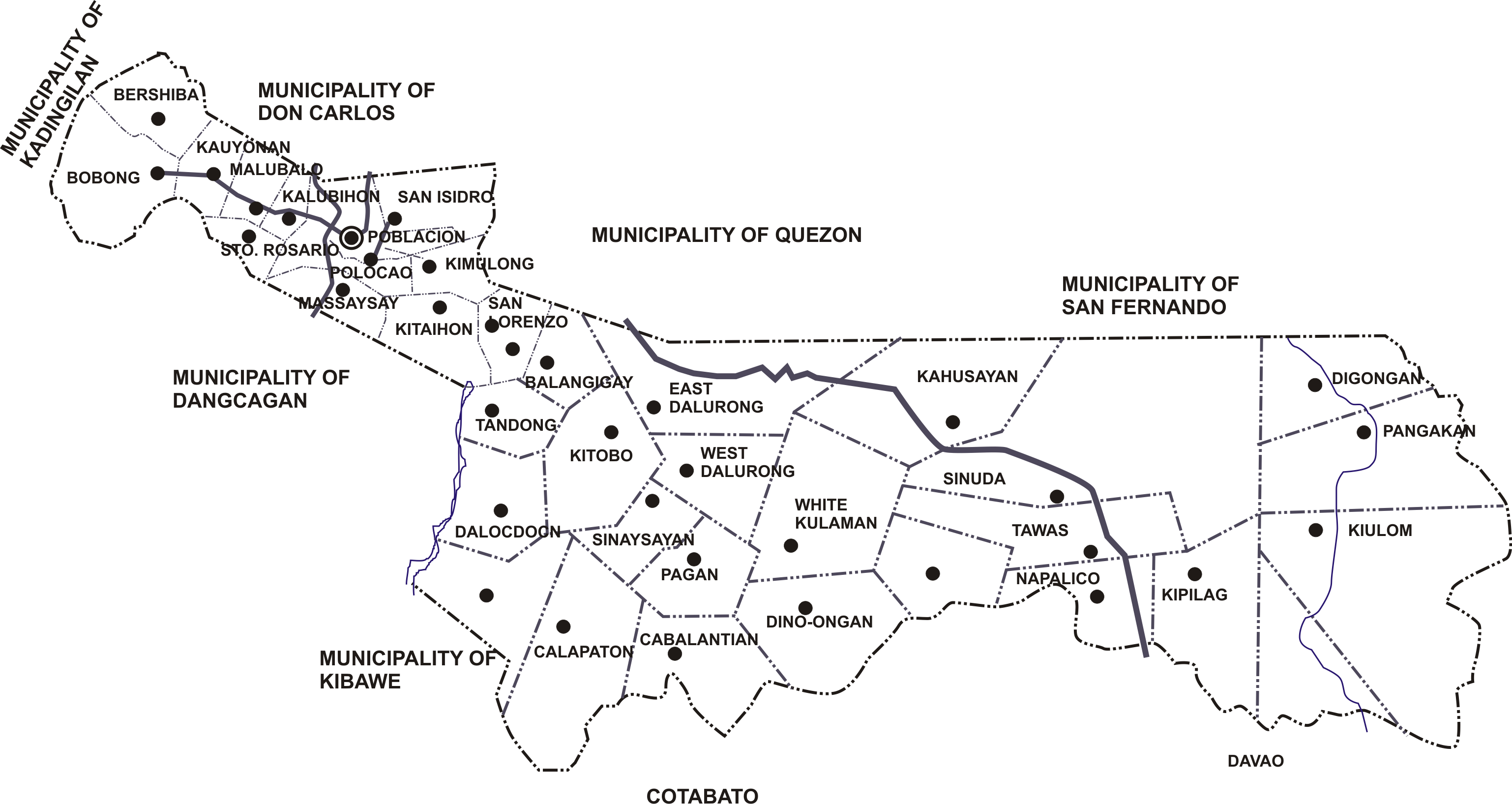 Political map of Kitaotao, Bukidnon